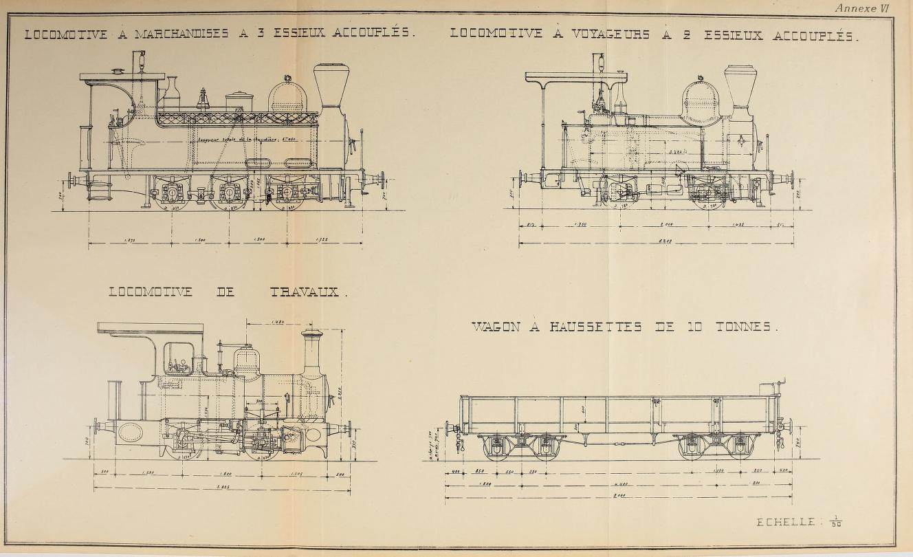 Le chemin de fer du Congo (Matadi-Stanley-Pool) (1907). Trois locomotives et une wagon